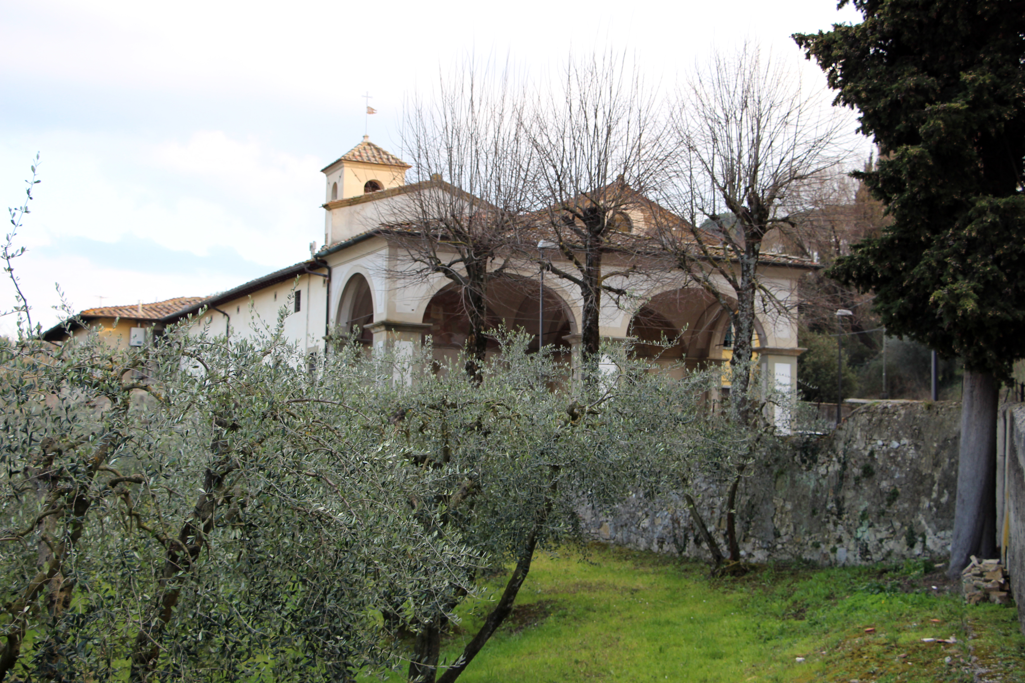 Santa Maria e Santa Brigida al Paradiso